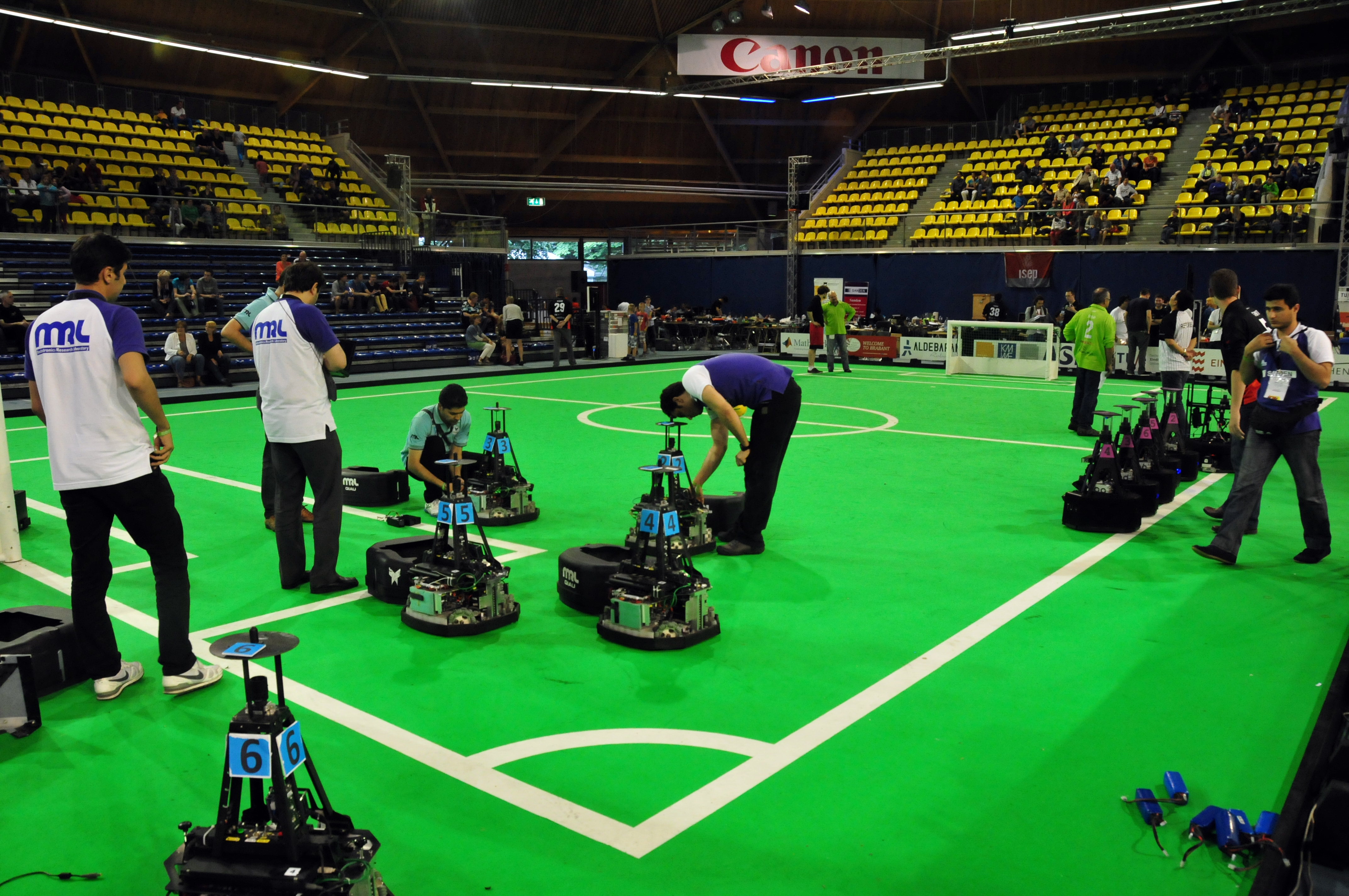 Eindhoven, Niederlande, Robocup 2013